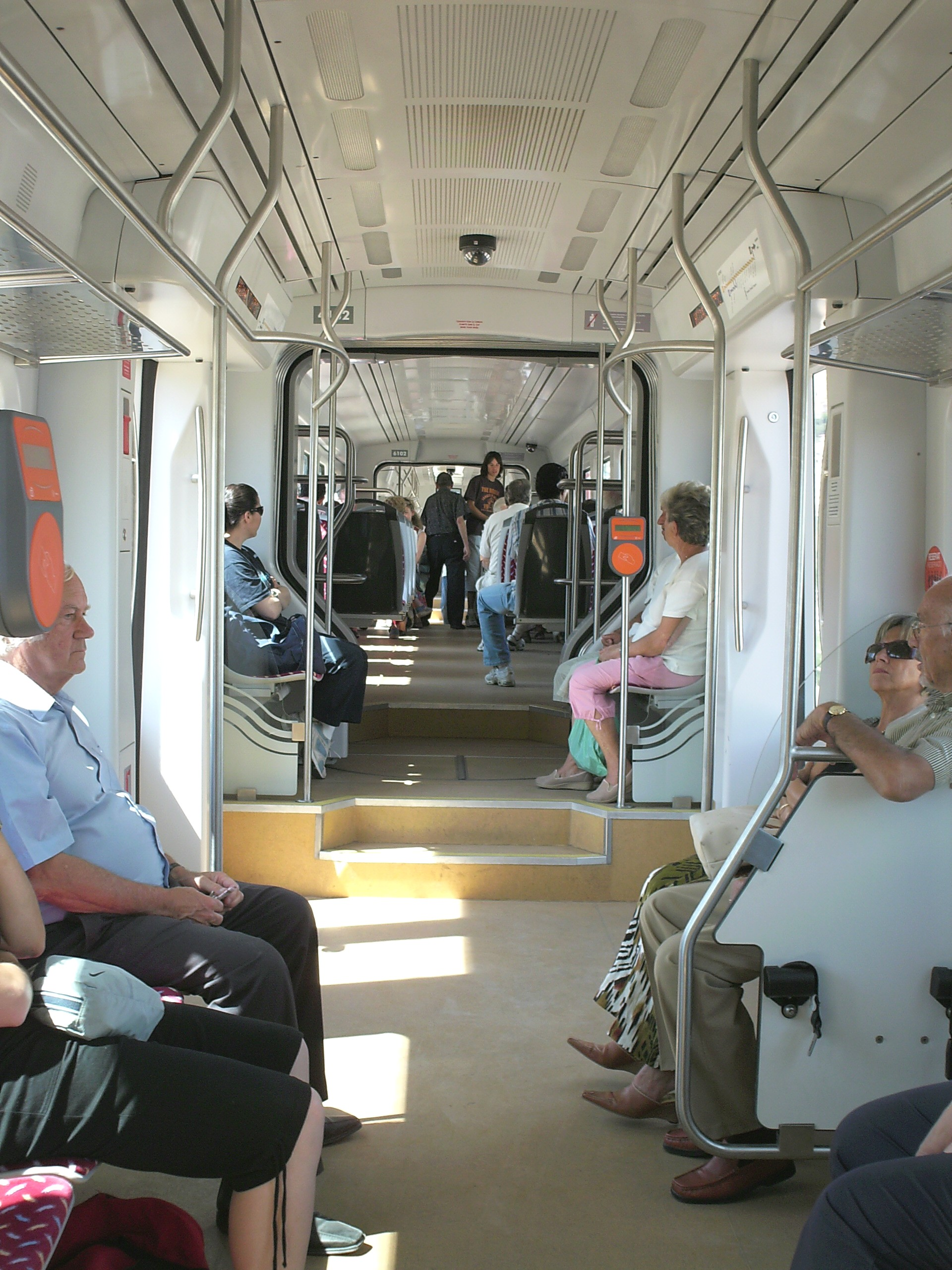 Innenraum eines Tram-Trains der Linie L3 der Stadtbahn Alicante / Interior de un tren-tram de la línea L3 del TRAM Metropolità d'Alacant